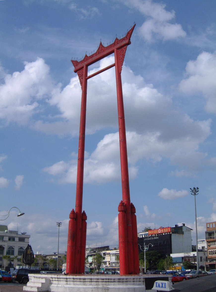 Sao Ching Cha (Giant Swing), Bangkok, Thailand